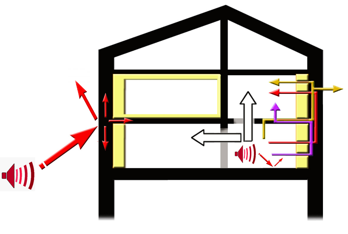 Exemples de diffusion du son dans la structures contruite d'une maison. Cette diffusion varie également selon l'intensité et la longueur d'onde du son, selon le matériau, l'incidence, et es effets de réverbération ou d'isolation (pour en savoir plus, voir par exemple : CSTB/DGALN, Guide Concilier efficacité énergétique et acoustique dans le bâtiment